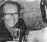 César Milstein, Premio Nobel de la Medicina.